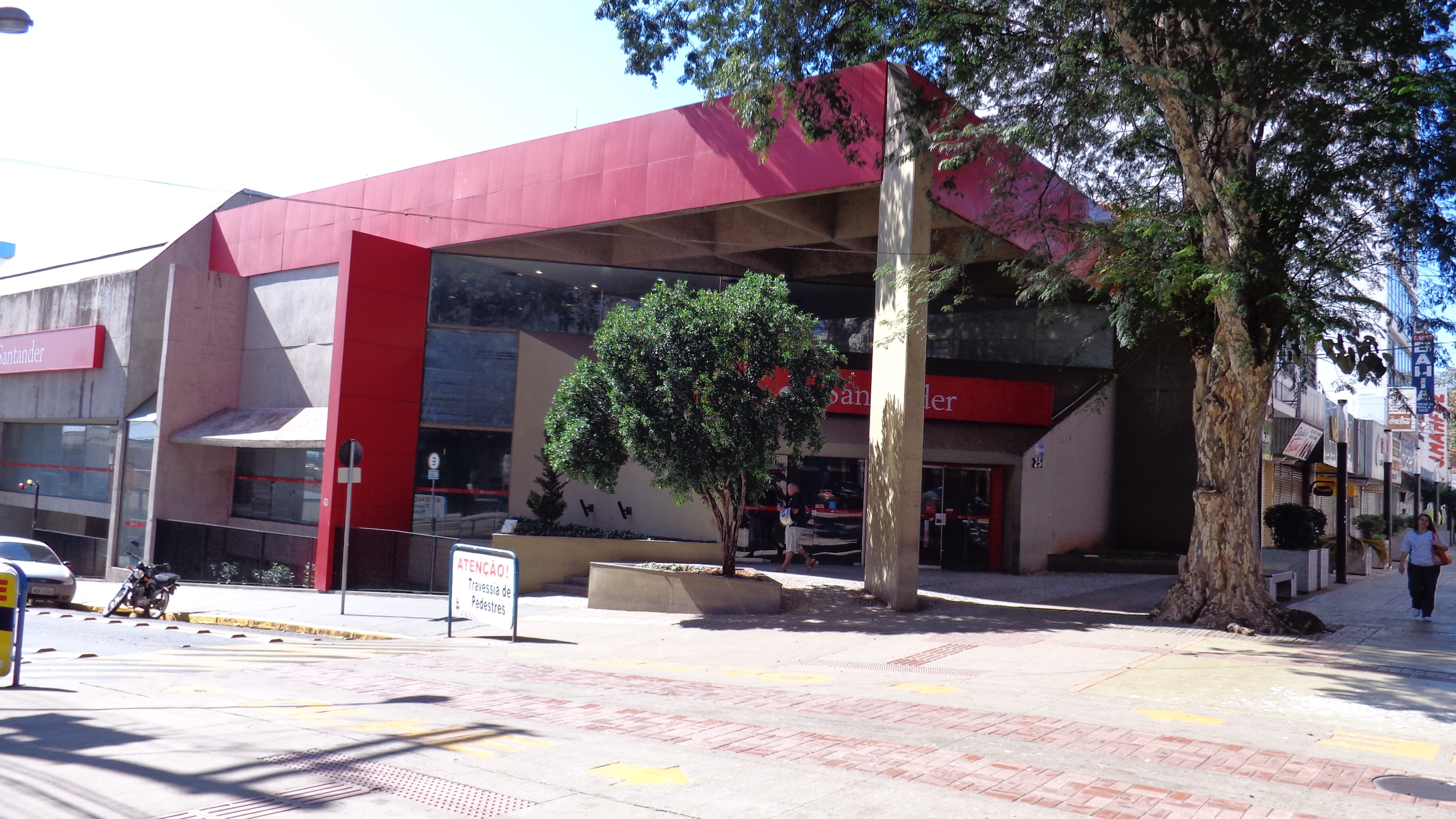 Banco Santander em Presidente Prudente